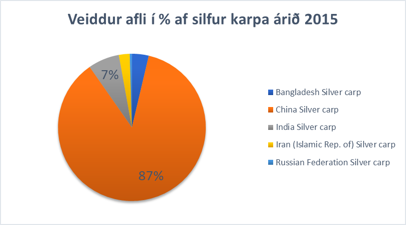 Afli silfur karpa í prósentum eftir þjóðum árið 2015.